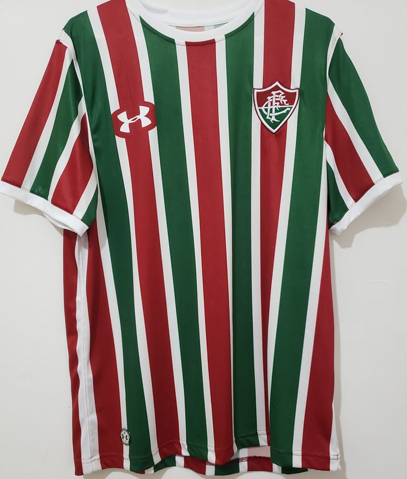 Camisa tricolor do Fluminense 2017-19 (outra versão).